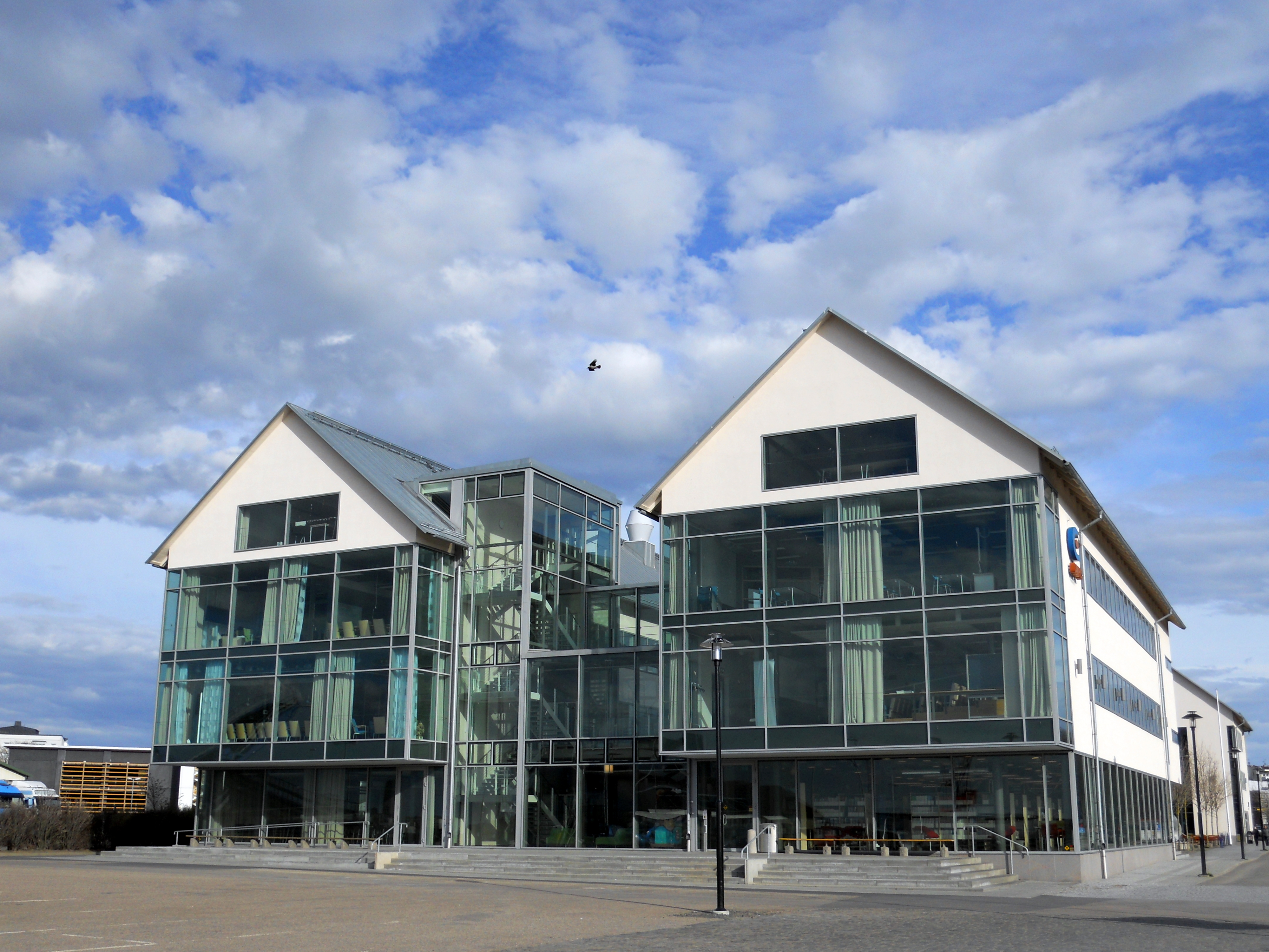 Högskolefilialen Campus Varberg.